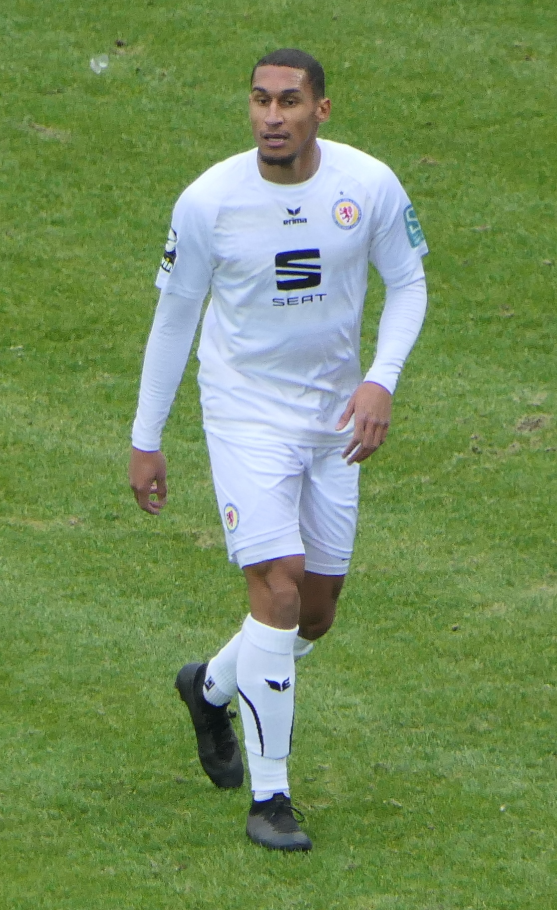 Der Fussballprofi Kevin Goden im Trikot von Eintracht Braunschweig beim Auswärtsspiel gegen den SV Waldhof Mannheim am 08.12.2019.